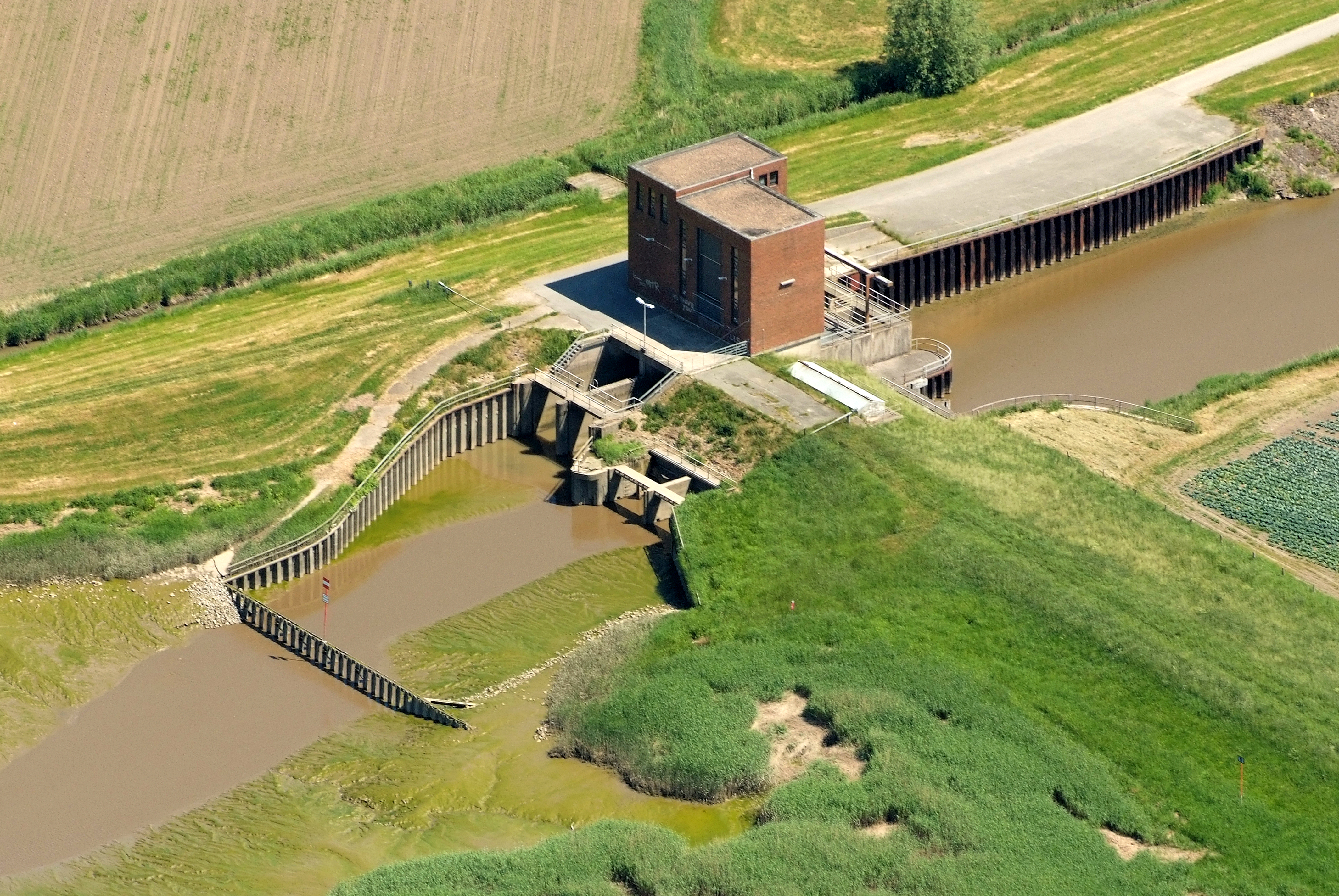 Fotoflug vom Flugplatz Nordholz-Spieka über Cuxhaven und Wilhelmshaven